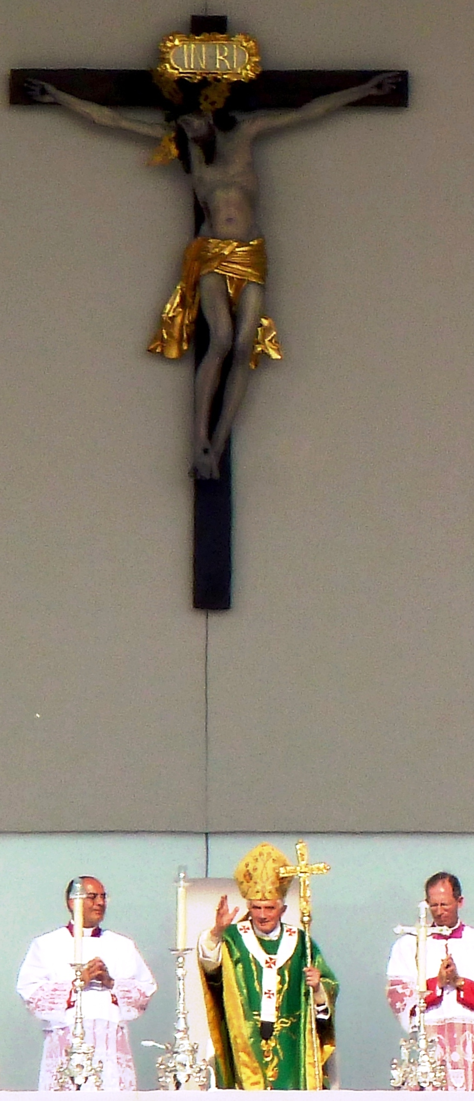 Papst Benedikt XVI. an der heiligen Messe in Freiburg, anlässlich seiner dritten apostolischen Reise in Deutschland. Das grosse, barocke Kruzifix aus Holz gehört zu einer Kreuzigungsgruppe des Bildhauers Hans Schenck vom 1622, welche aus dem Radolfzeller Münster für den Altar der Papstmesse nach Freiburg gebracht wurde.